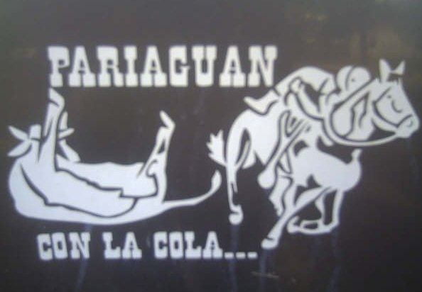 coleo